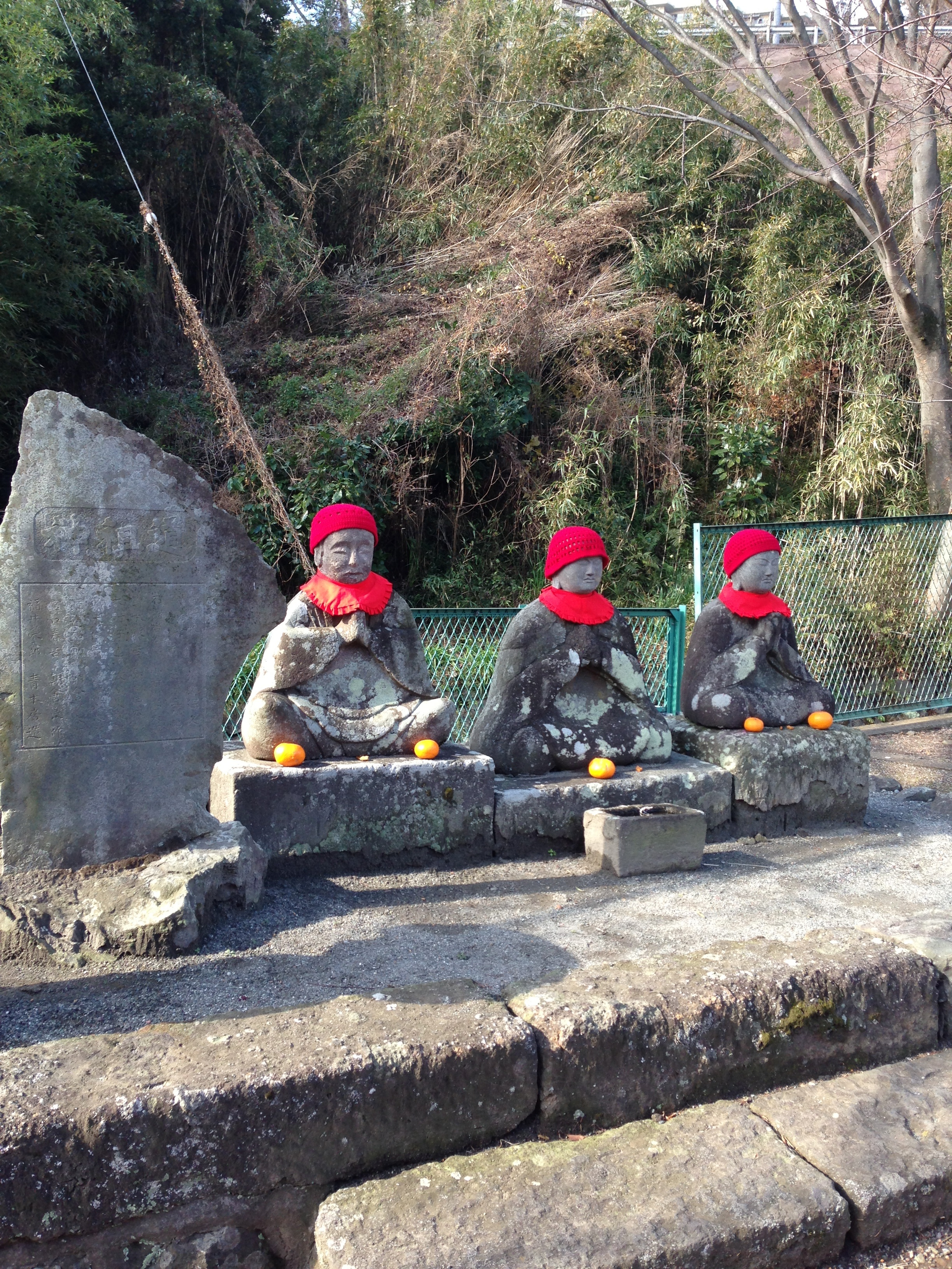 特産の石材を江戸に運ぶために村の男性たちが海にくり出していった頃、皆が祈りをこめた道祖神。真鶴に見られるのは神奈川県西部特有のもので、僧侶の形をしている。赤い前掛けをした姿はまさに日本昔話の世界である。